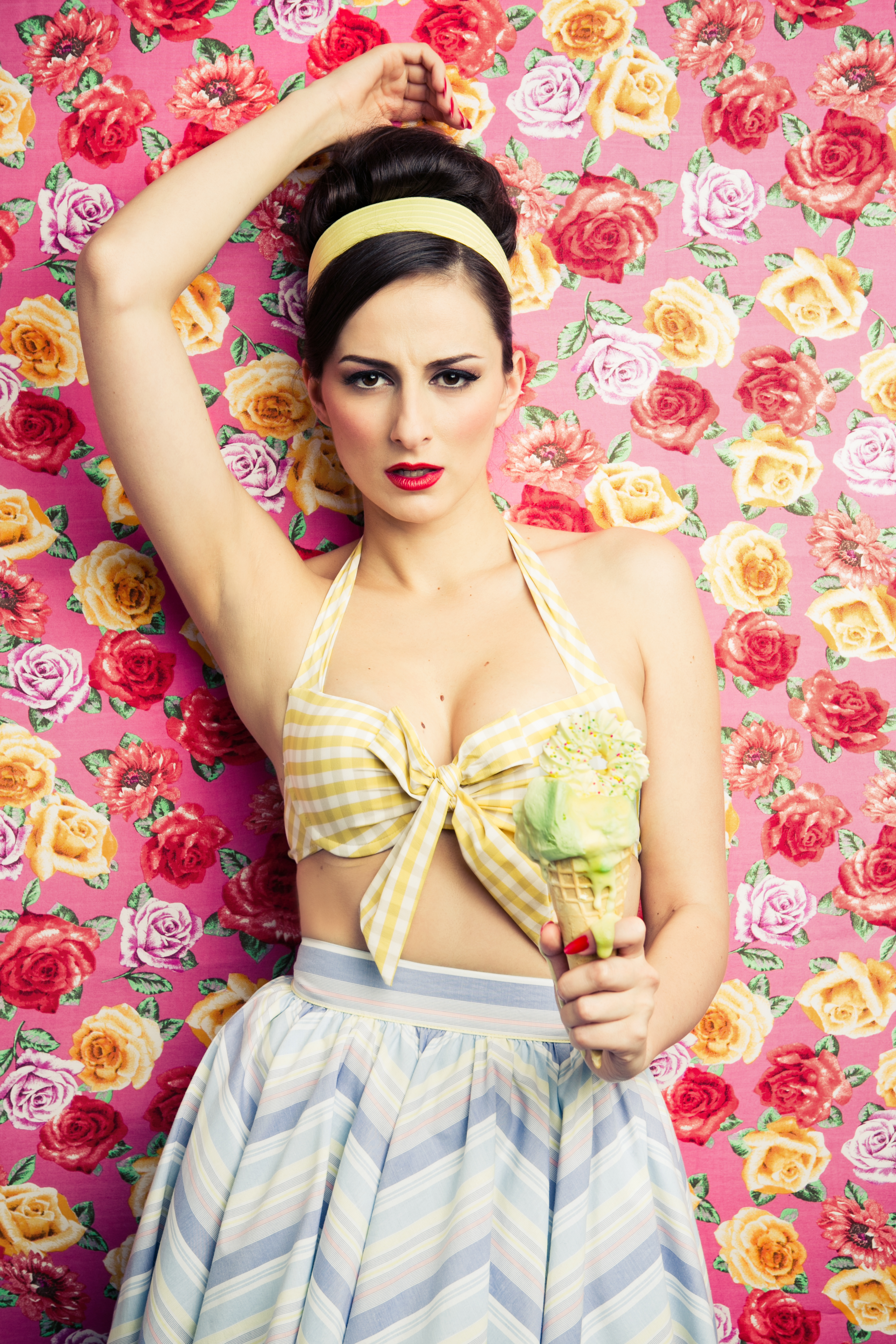 Pressefoto von Marla Blumenblatt zu „Immer die Boys“